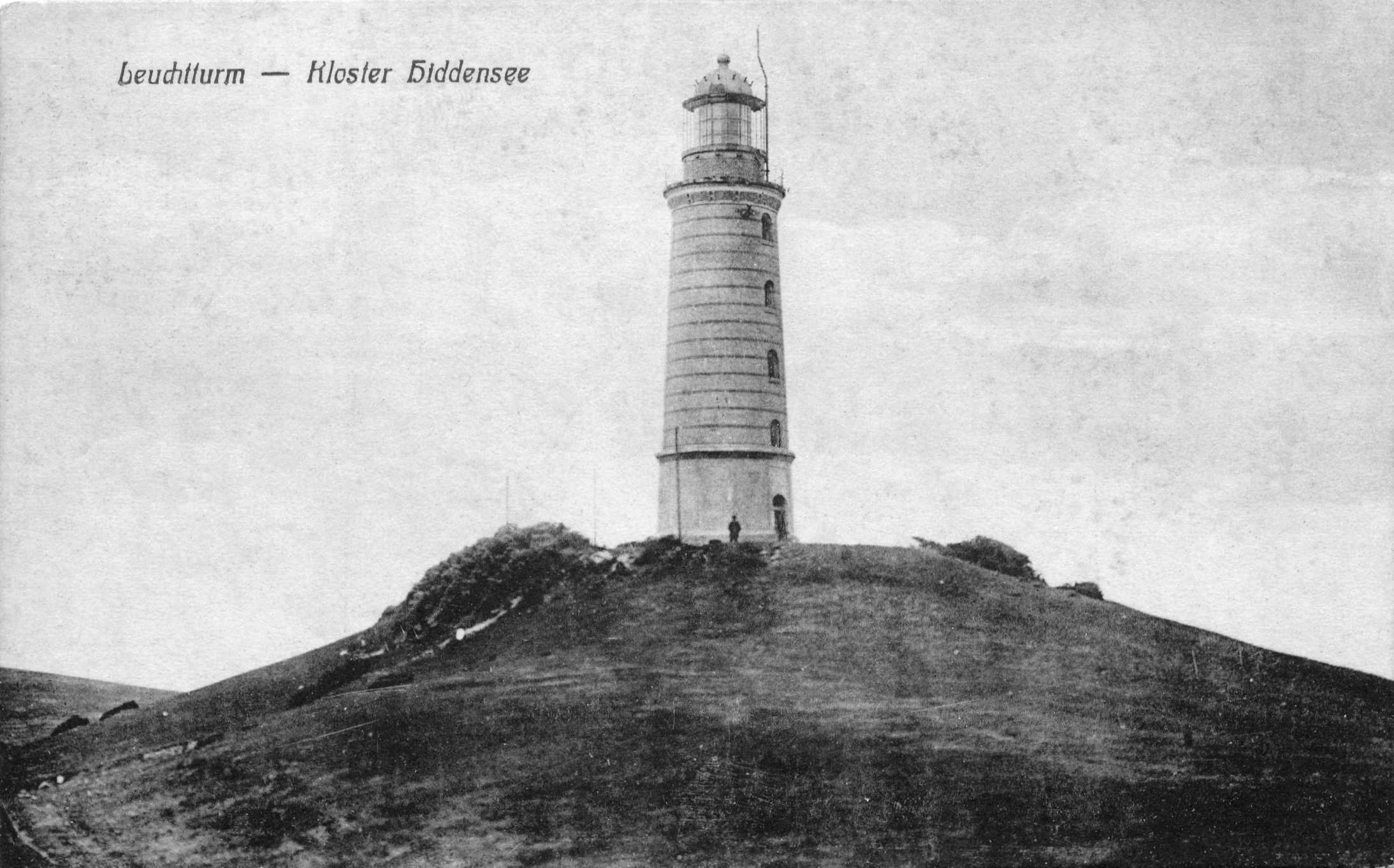 Leuchtturm Dornbusch auf Hiddensee